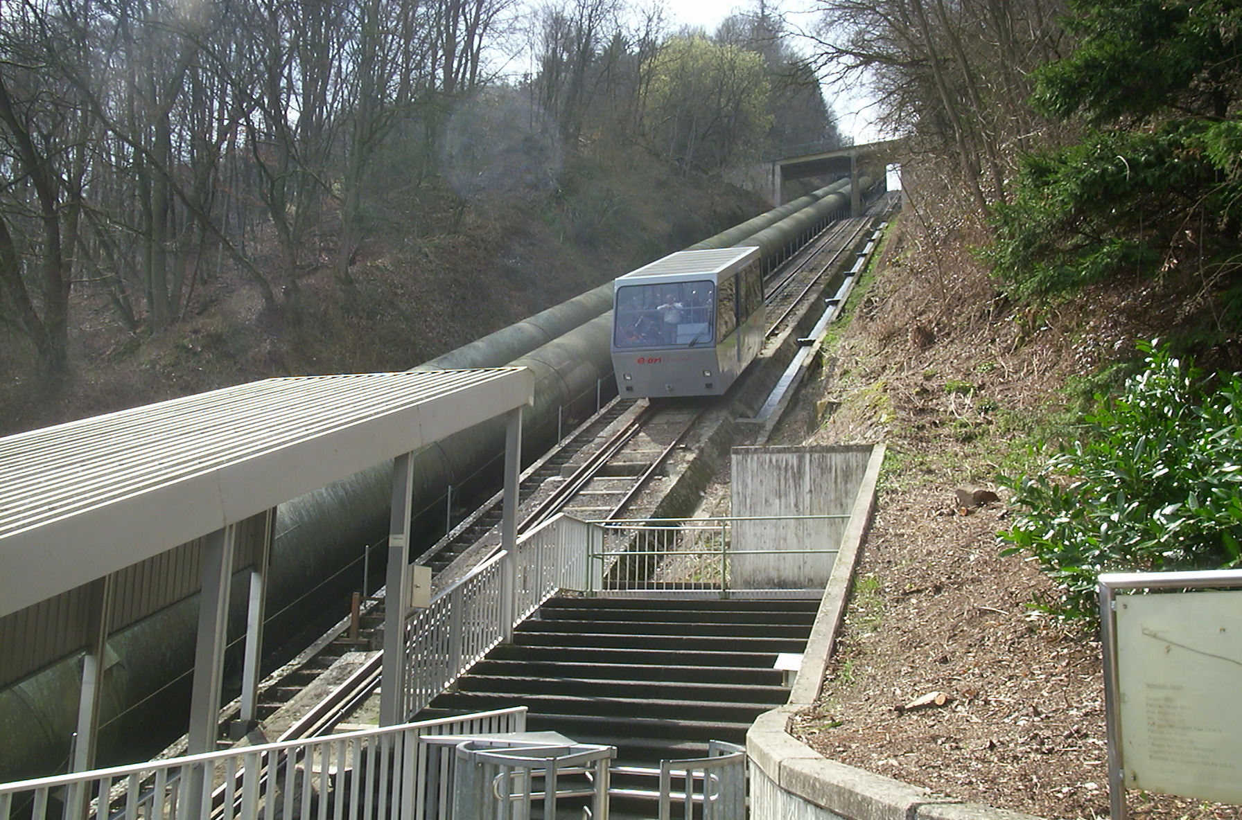 Standseilbahn am Peterskopf, nach Generalsanierung in 2005. Baujahr 1983, länge 917m, Fahrzeit ca 10 min.